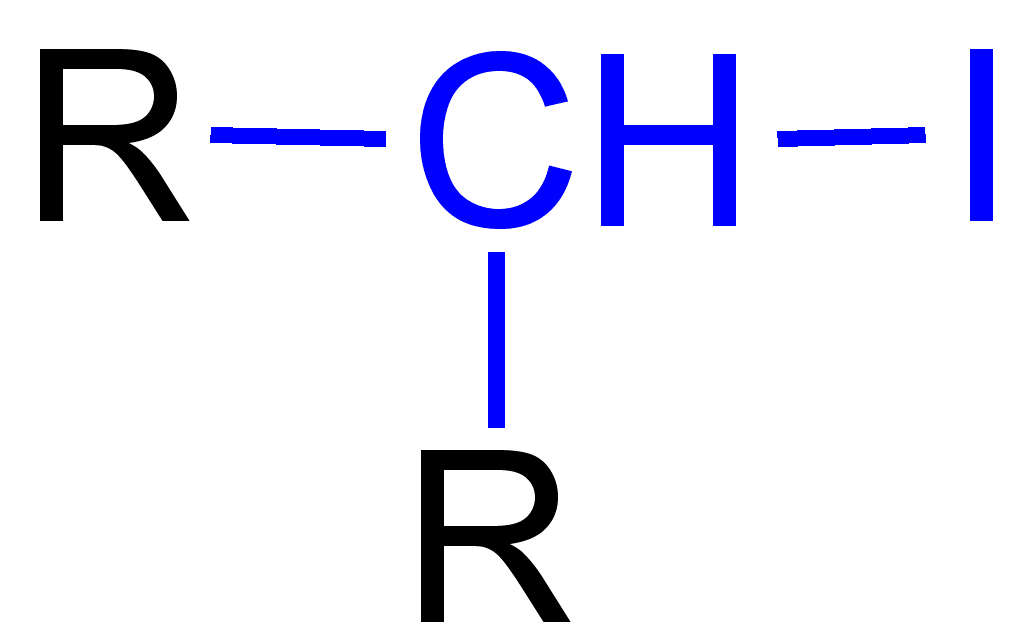 sekundäre Iodaklane